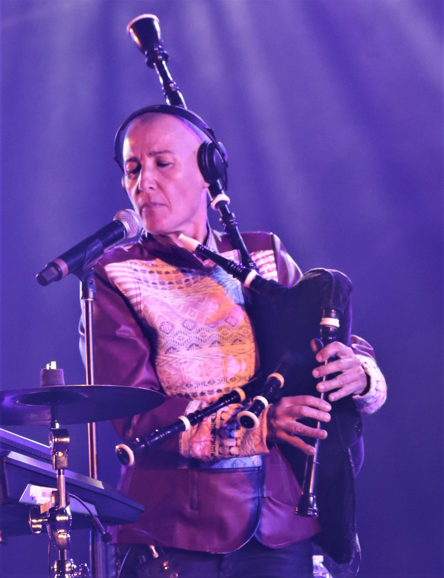 Concert de Mercedes Peón pendant le festival interceltique de Lorient 2019